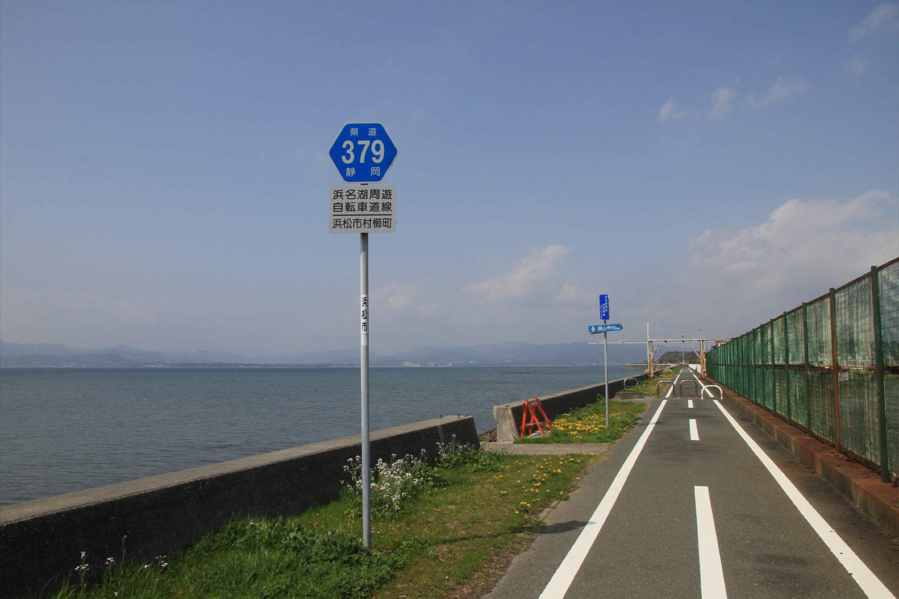 静岡県道379号浜名湖周遊自転車道線（浜松市西区村櫛町）